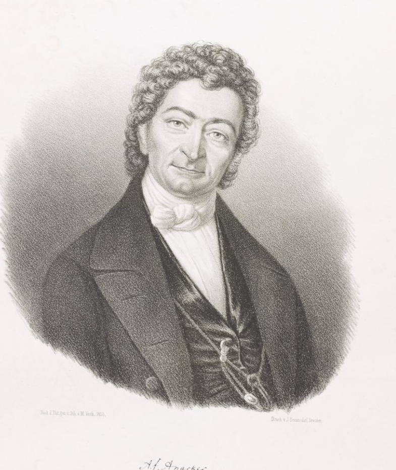 Lithographie mit dem Portrait des sächsischen Komponisten August Ferdinand Anacker (1790-1854).